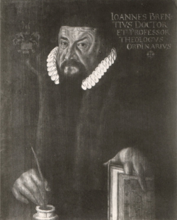 Johannes Brenz (junior), Tübinger Professor, Sohn des Reformators Johannes Brenz